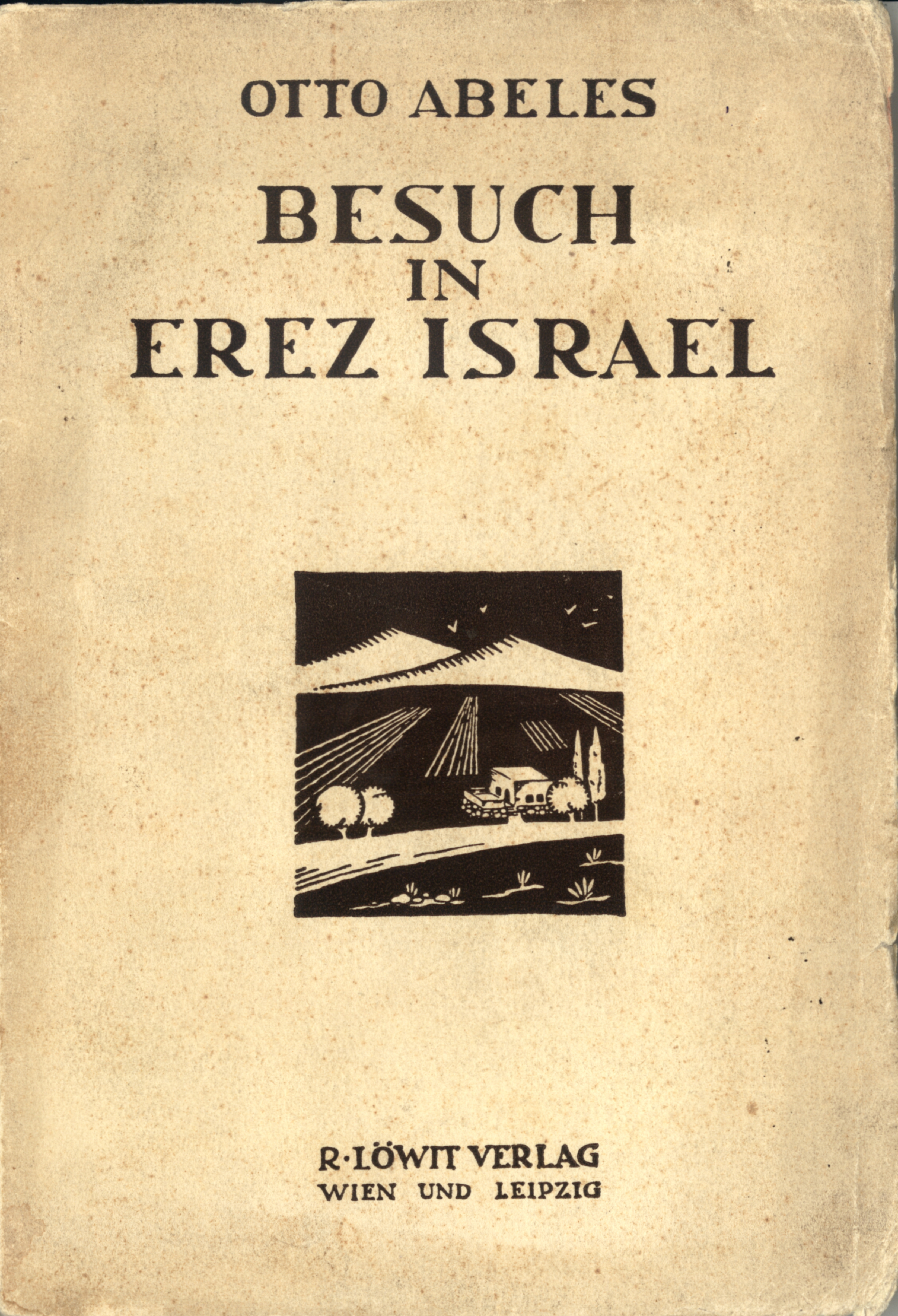 Otto Abeles: Besuch in Erez Israel. Book, Cover